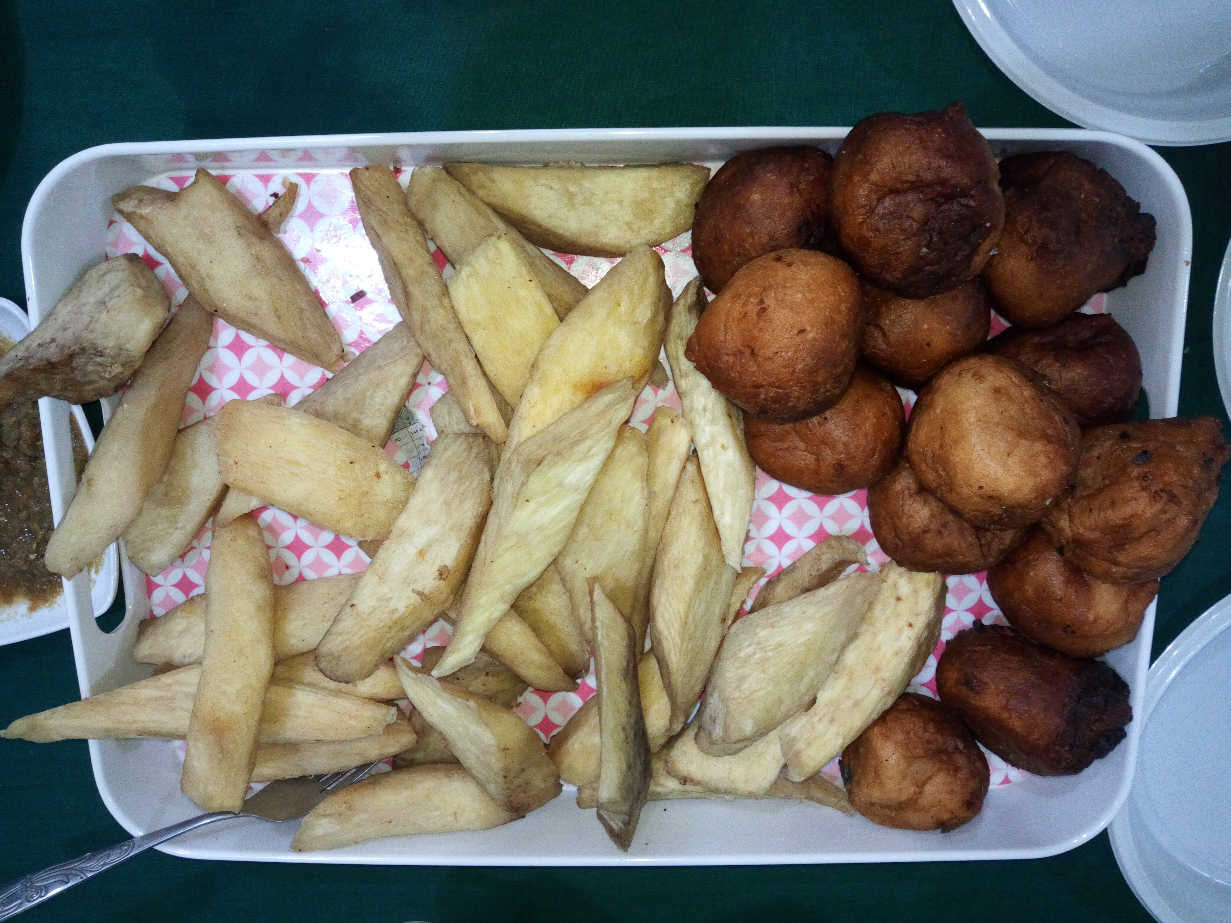 Igname frit avec huile à WIKI LOVES MONUMENTS BENIN 20192